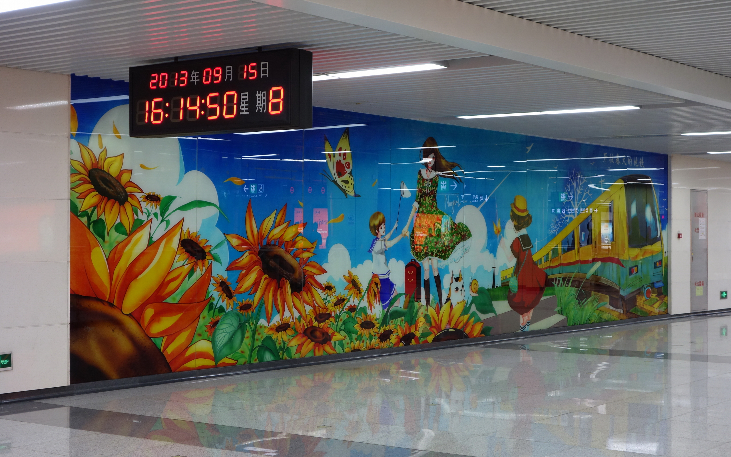 蛇口線侨香站的站厅装饰